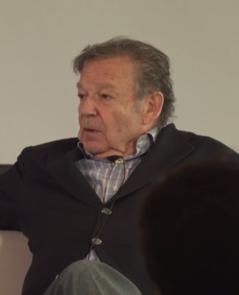 Luis Racionero